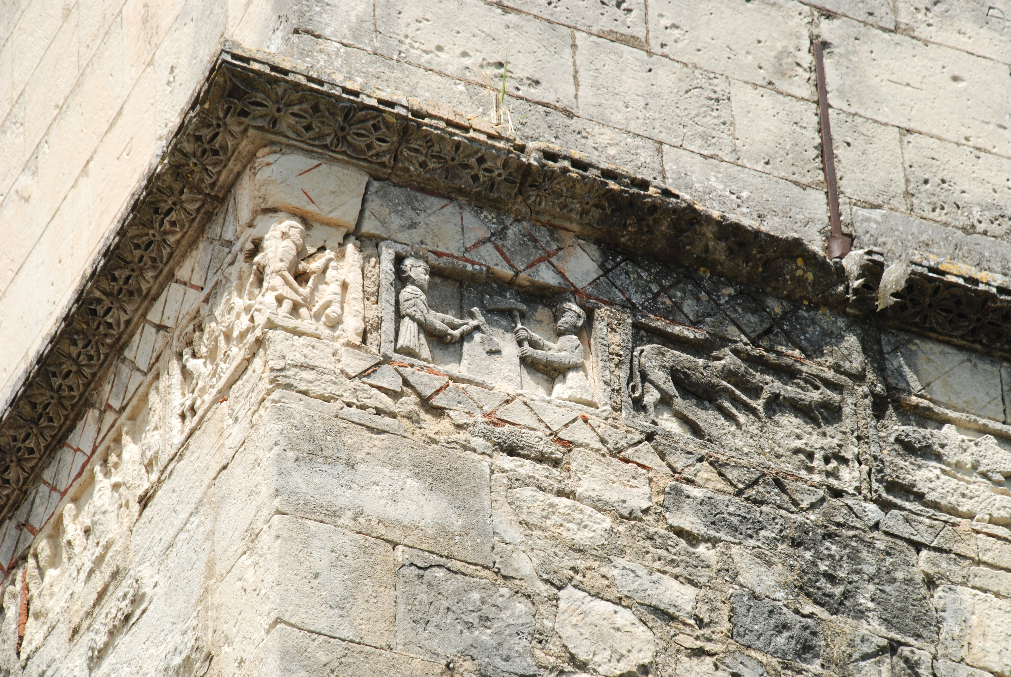 France - Drôme - Tour funéraire de Saint-Restitut - Frise romane